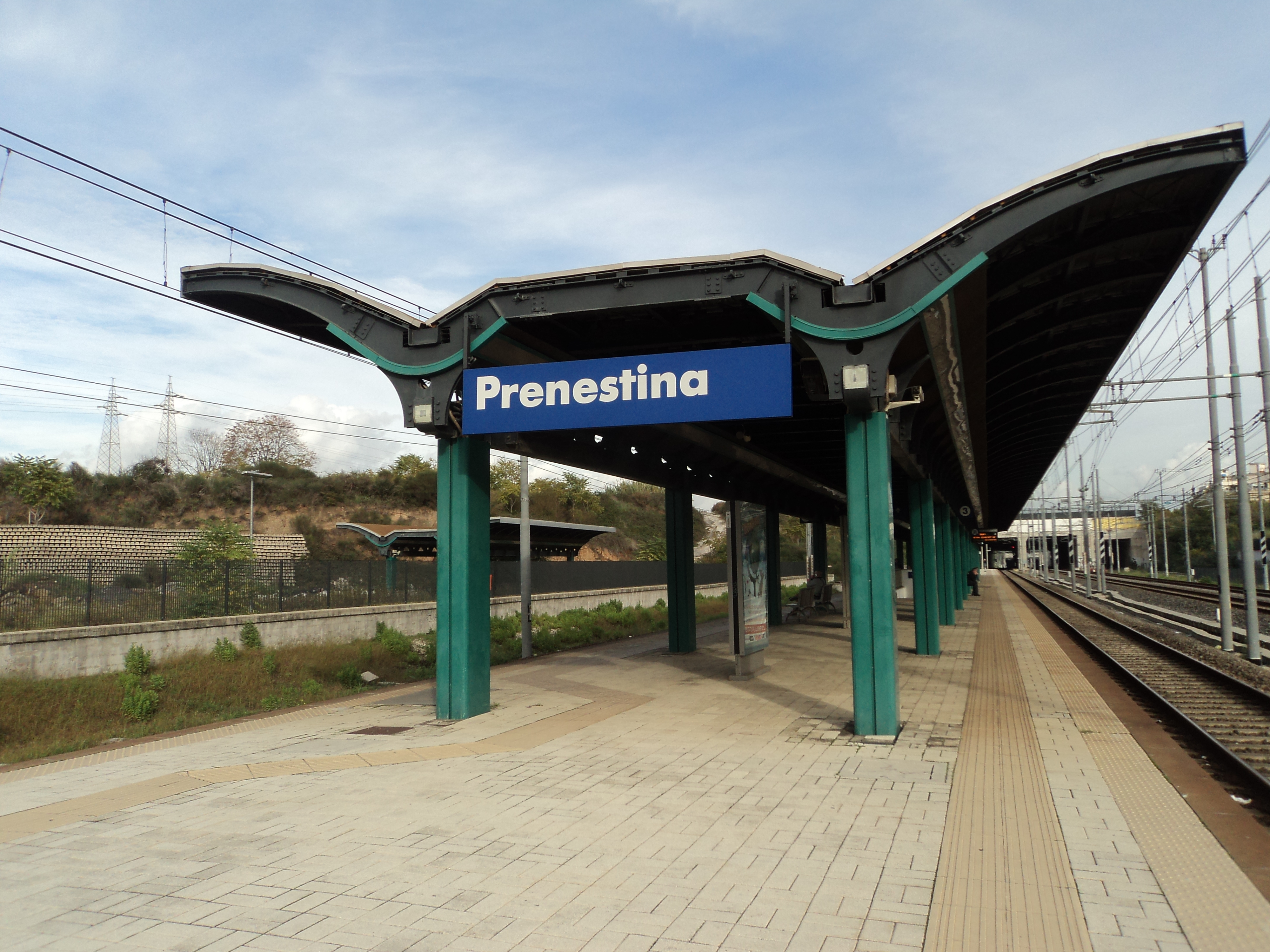 Stazione Prenestina. Per altre foto